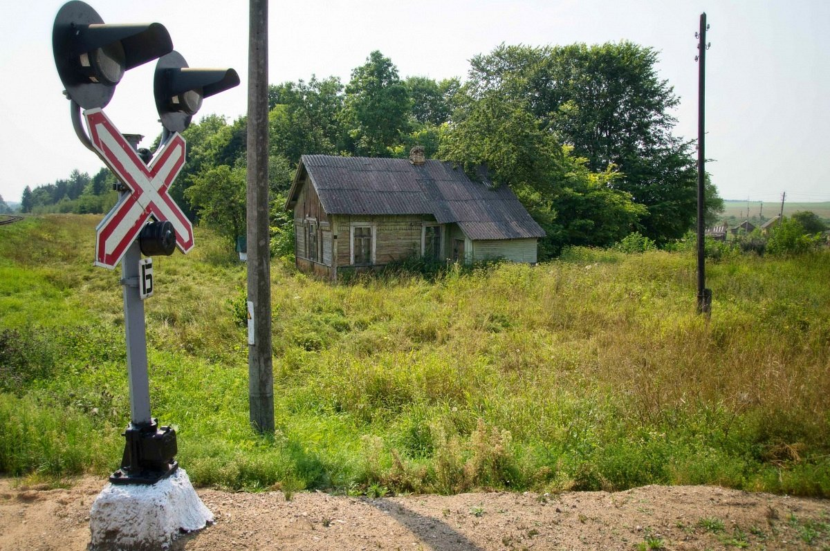 Валодзькі. Чыгуначная службовая пабудова